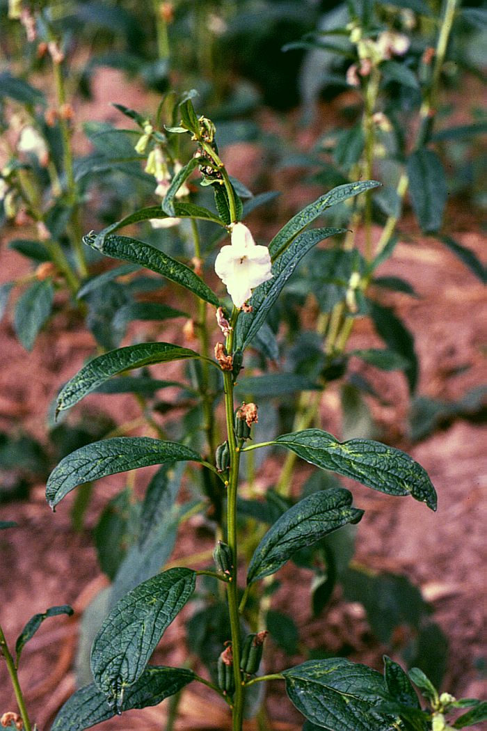 Sesamum indicum, Pedaliaceae - Kambodscha/Cambodia, Insel im Mekong bei Kratie (Prov. Kratie)